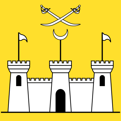 Stema Raialei Hotinului 1715-1810